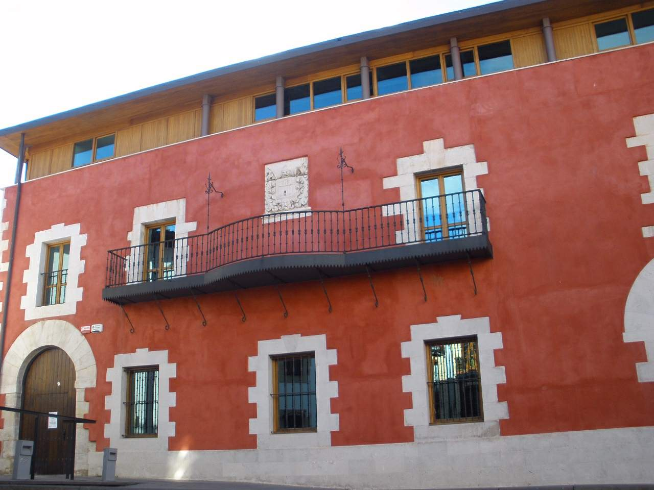 Ayuntamiento y antigua iglesia de San Martín, en Salvatierra-Agurain (Álava)